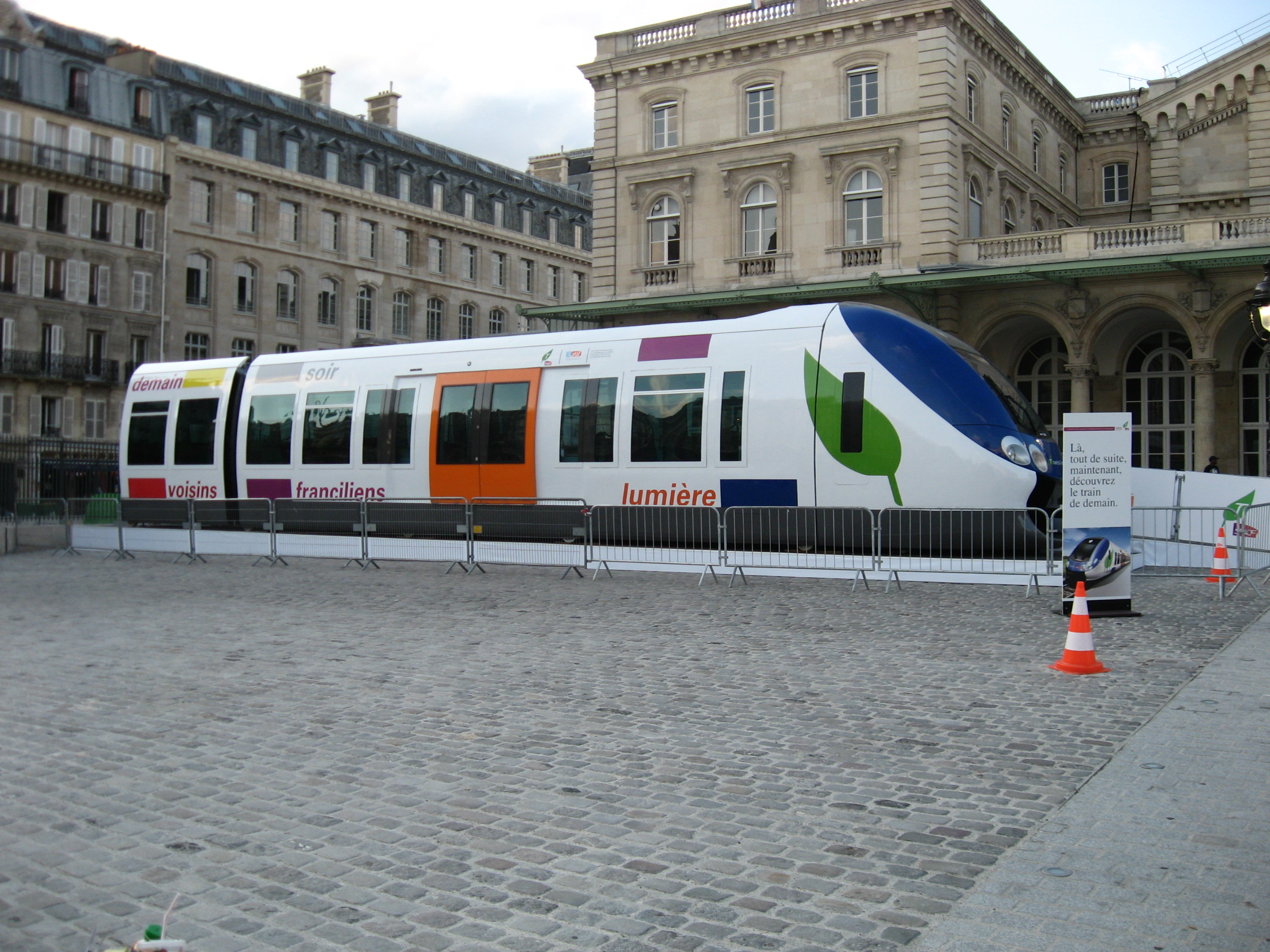 Transilien exposition in Gare de l'Est.